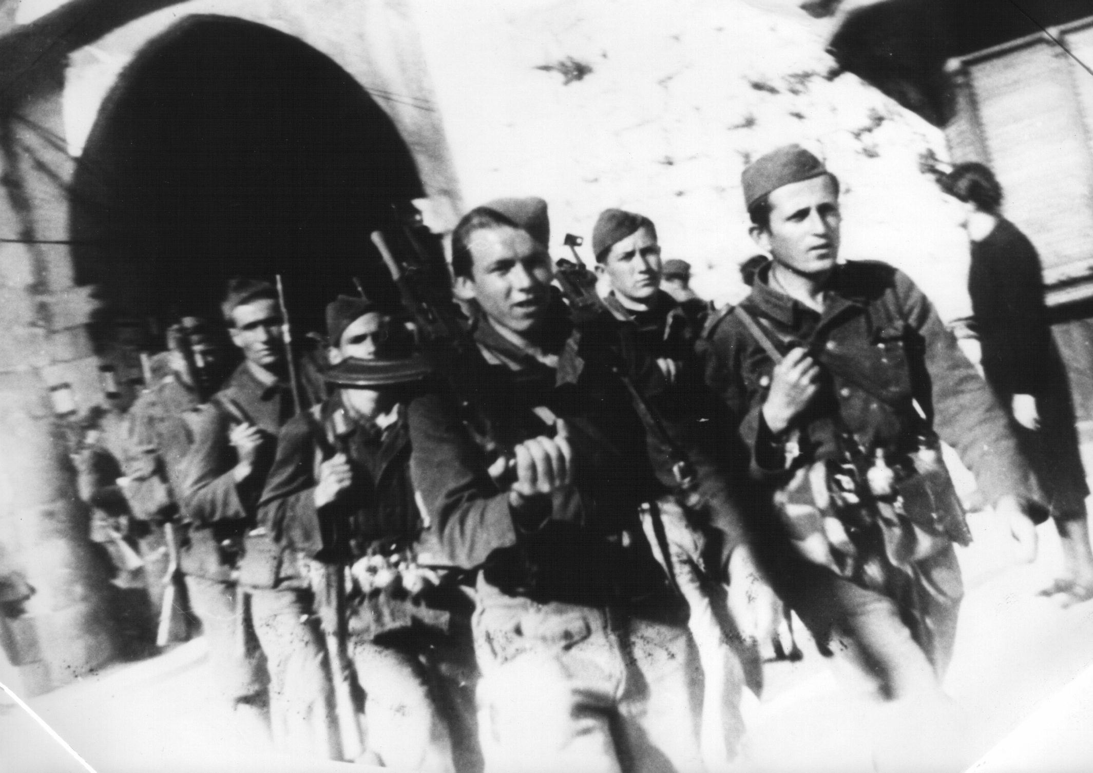 Srpskohrvatski / српскохрватски: Херцеговачки и Далматински партизани улазе у Дубровник, борци 2. далматинске бригаде, октобар 1944.